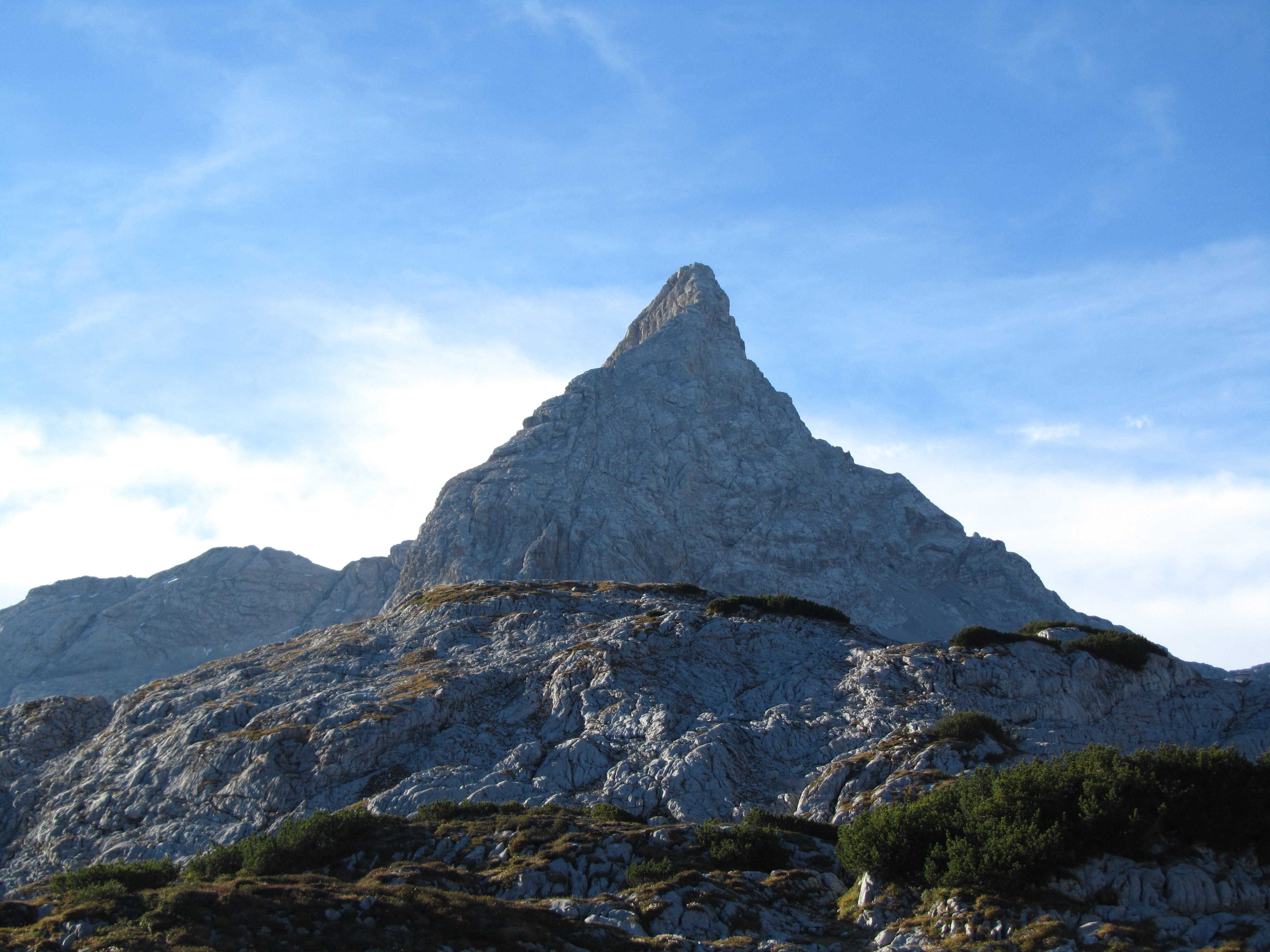 Die Schönfeldspitze (2653 m) im Steinernen Meer (Berchtesgadener Alpen), Ansicht vom Weg zwischen Kärlingerhaus und Riemannhaus.